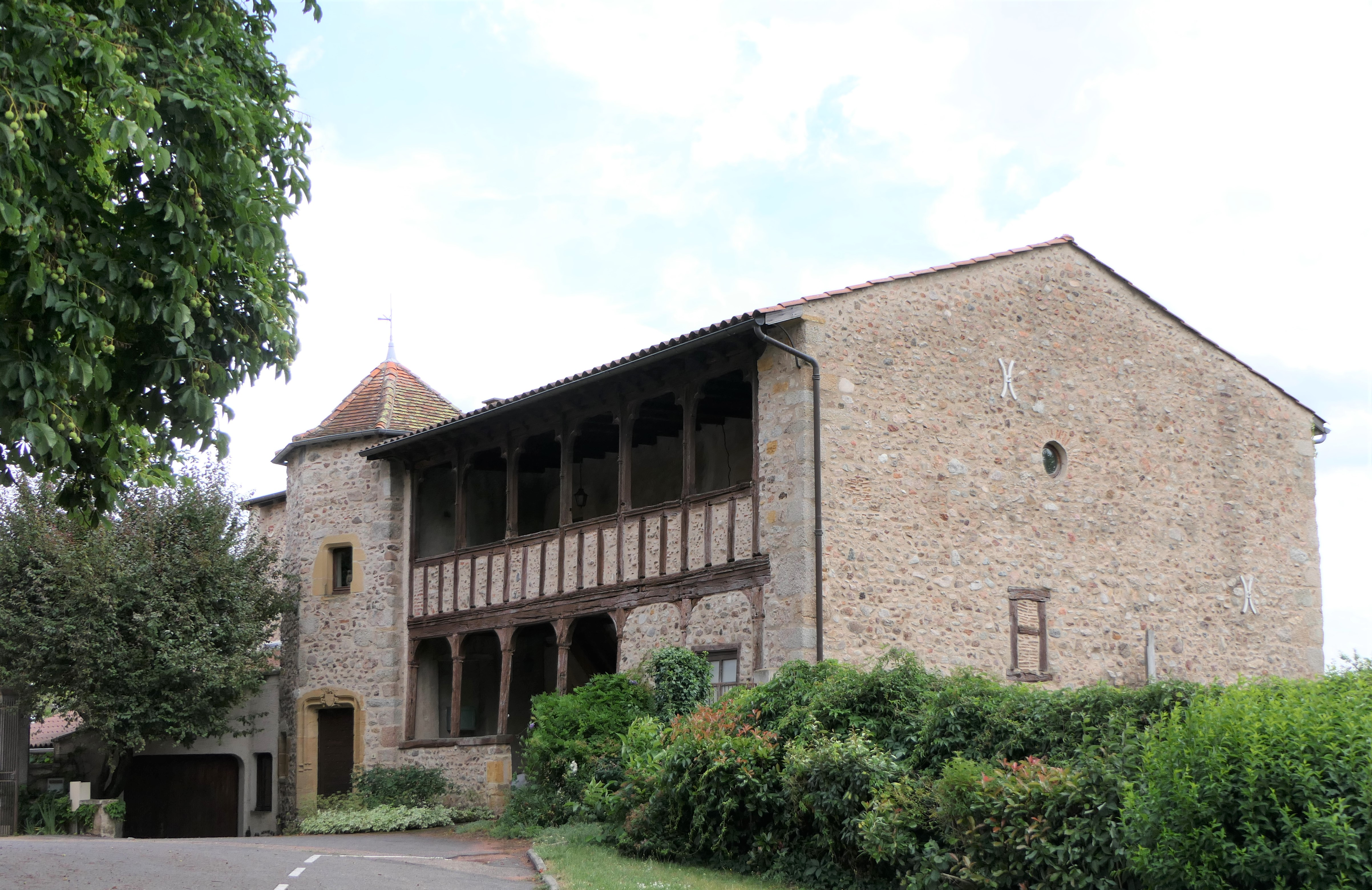 Pouilly-les-Nonains le prieuré